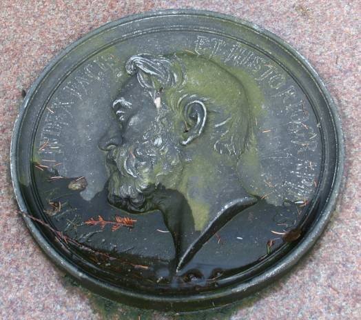 Detail des Gedenksteins für Anton Fahne: Bronzeplakette